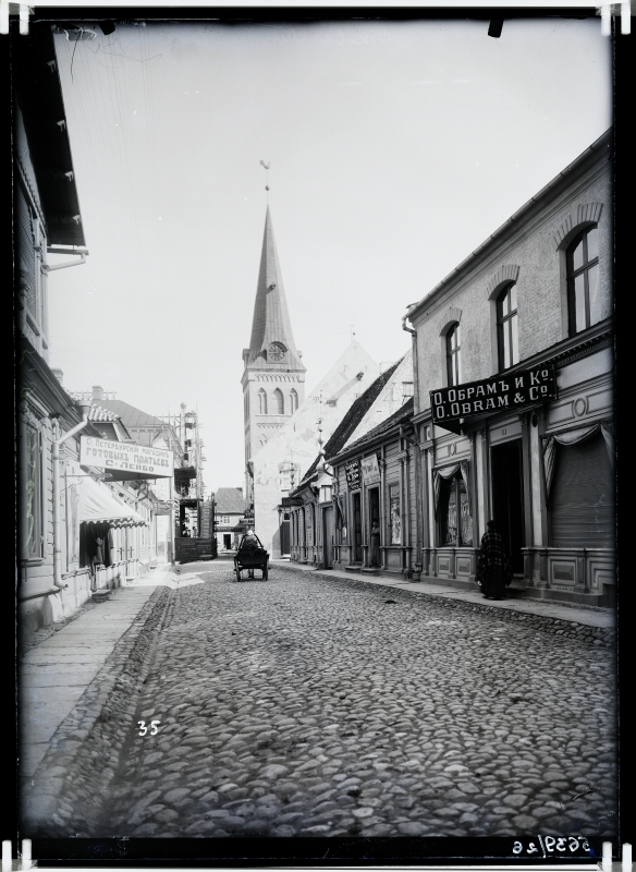 Muuseumikogu Negatiivid Muuseumikogu Negatiivid füüsiline kirjeldus Emulsioonipoolel all vasakus nurgas tindikirje: "35" kommentaar x